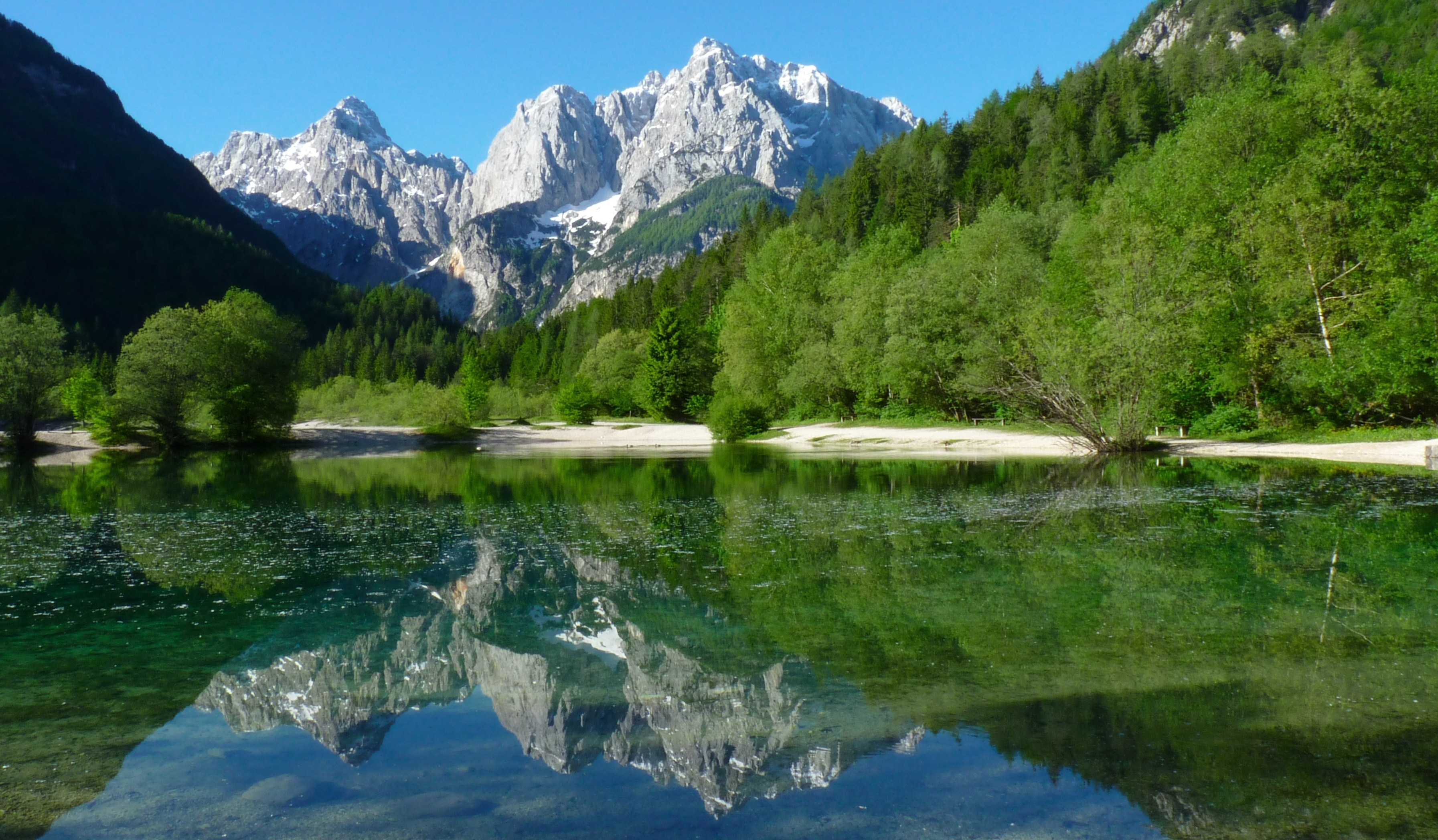 Nationalpark Triglav (Triglavski narodni park)